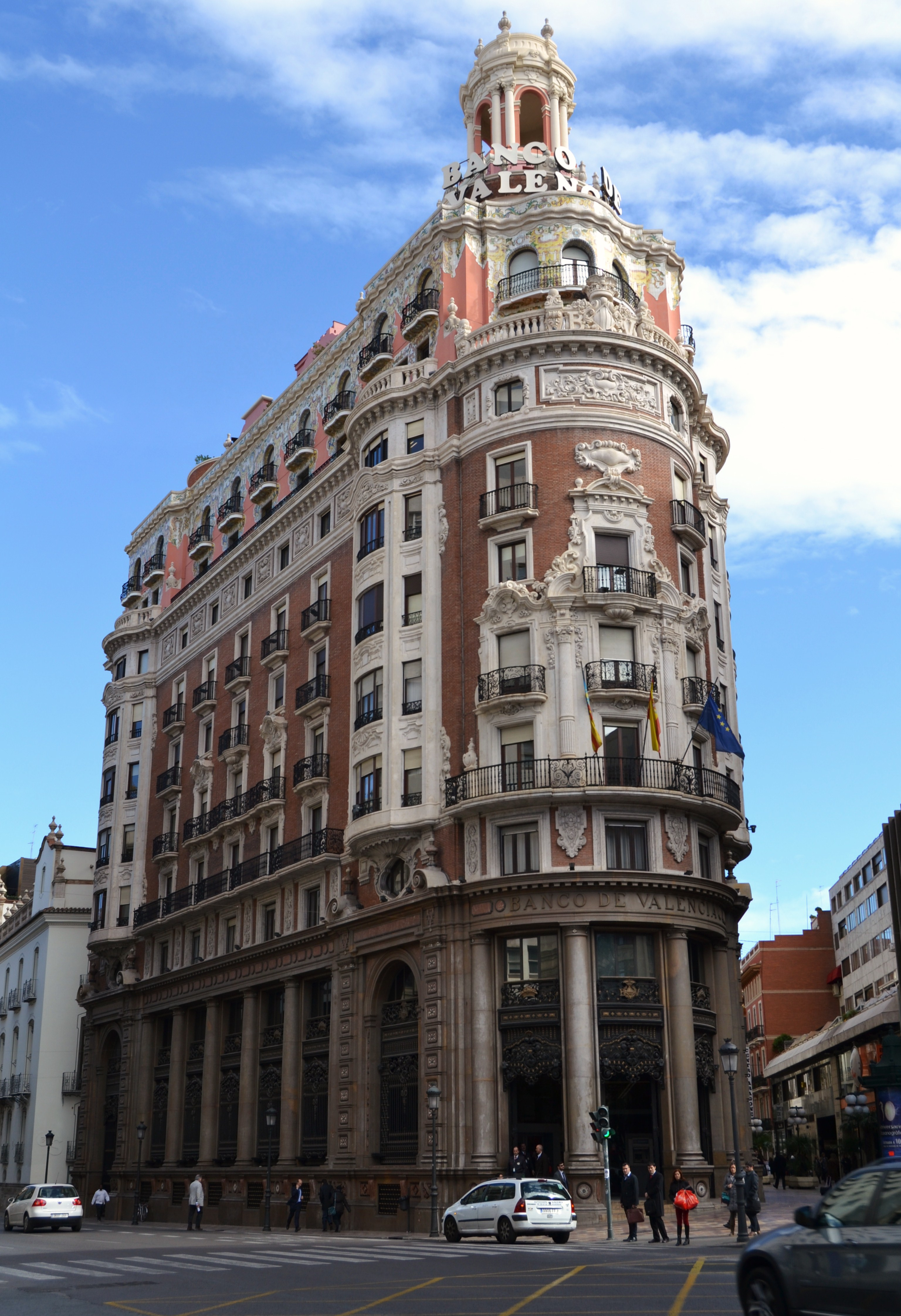 Edifici del Banc de València.